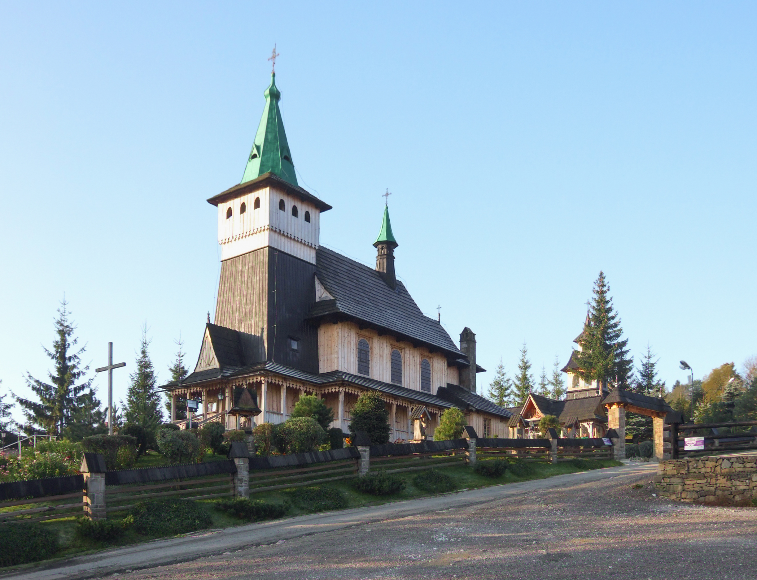 Kościół w Witowie koło Zakopanego